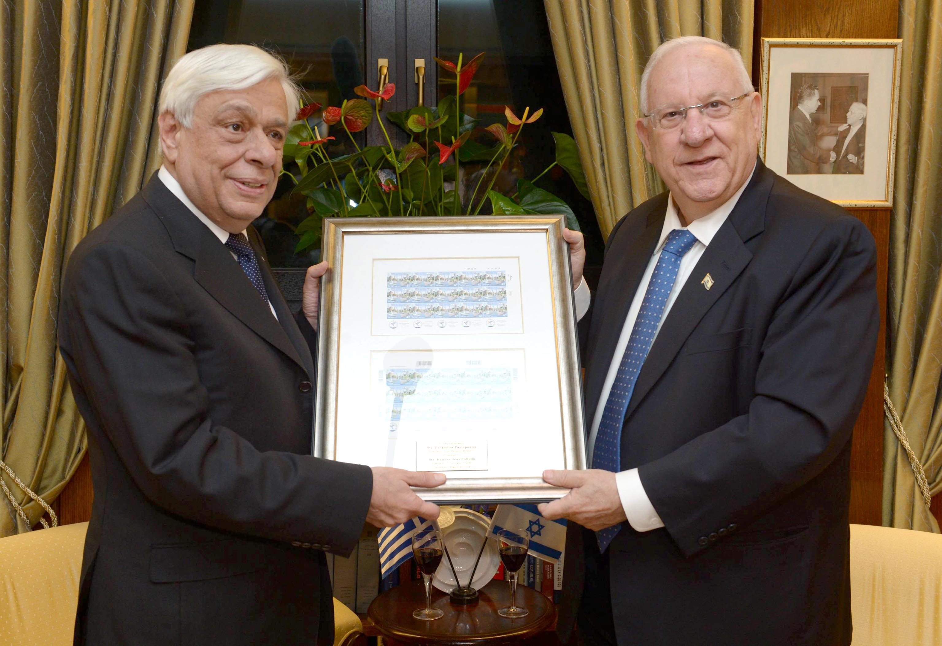 נשיא מדינת ישראל ראובן ריבלין מארח את נשיא יוון פרוקופיס פוולופולוס בעת ביקורו במדינת ישראל